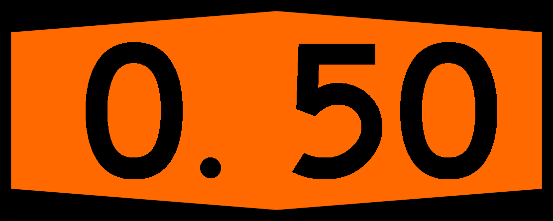 Otoyolu 50